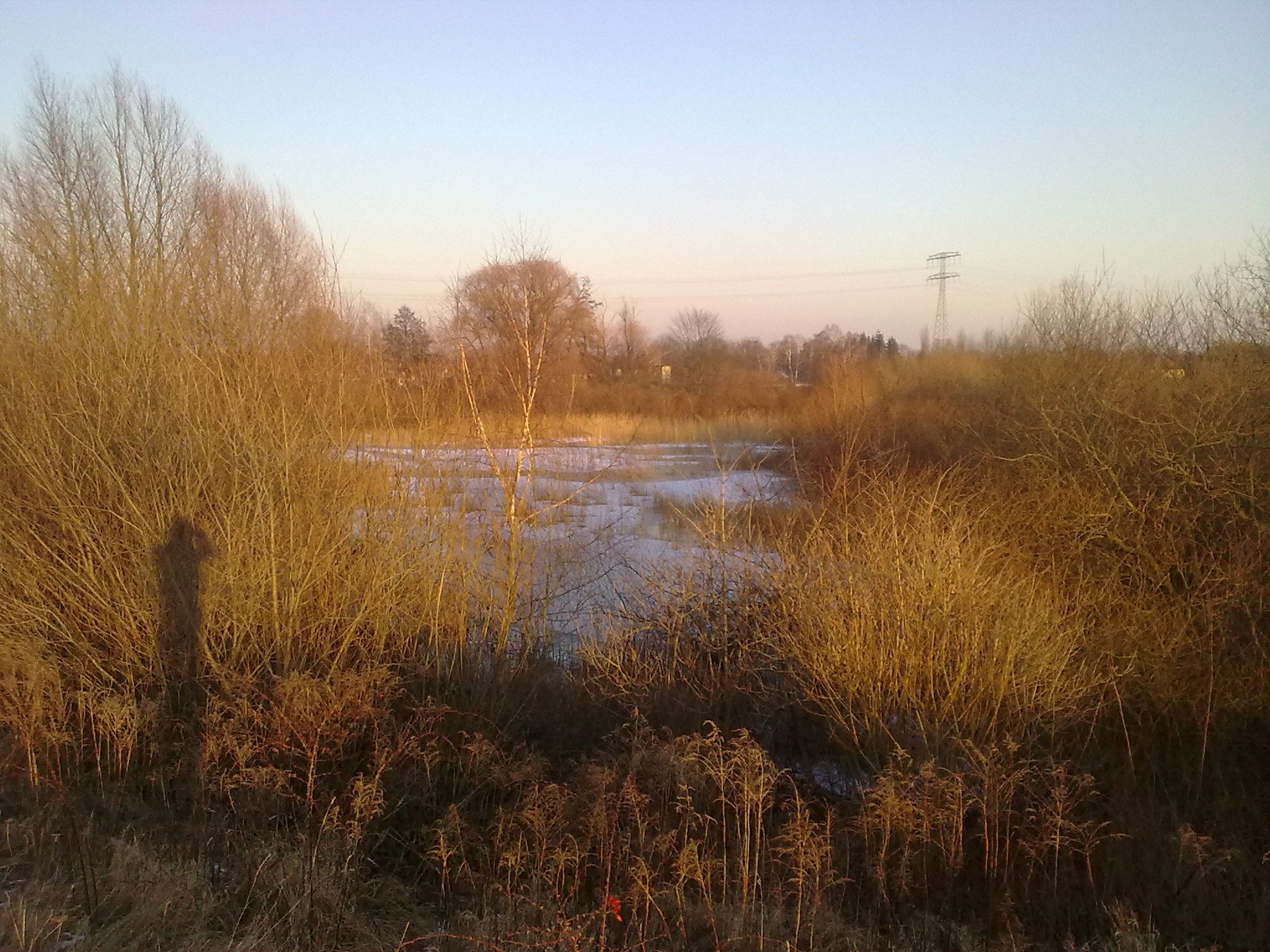 Blick auf den Gehrensee von Süden